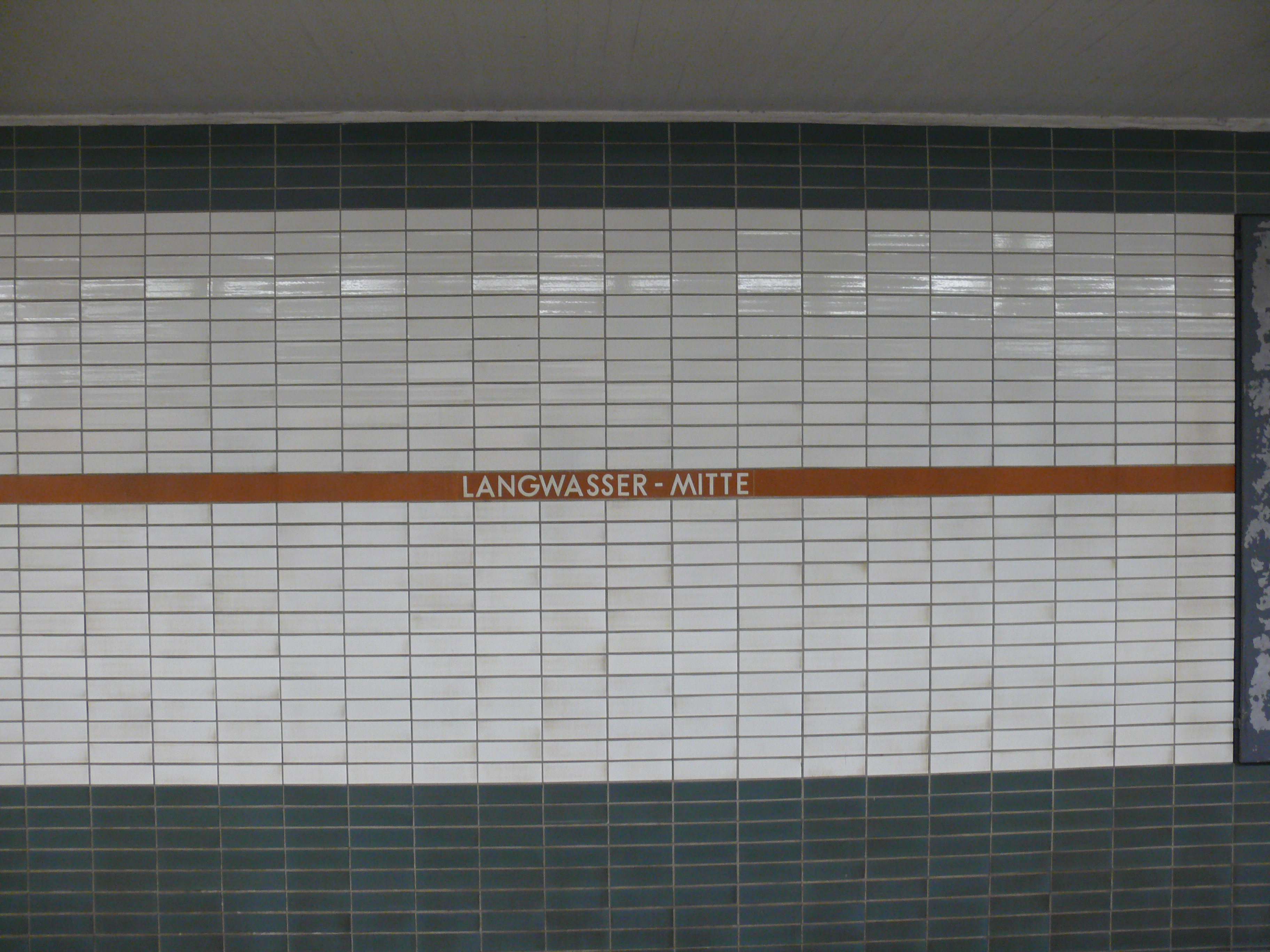 Stationsname an den Bahnsteigwänden am U-Bahnhof Lanwasser Mitte in Nürnberg.